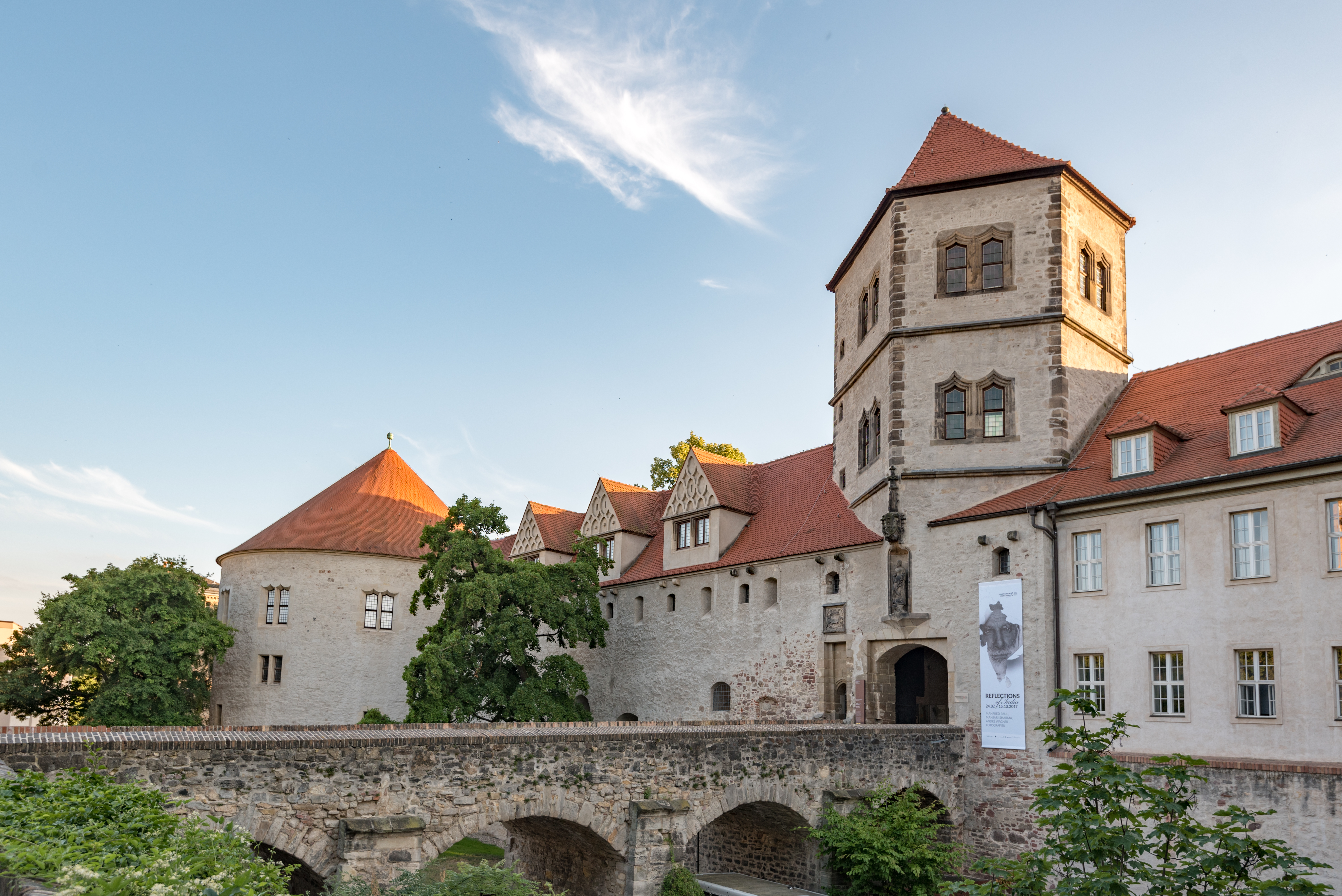 Halle (Saale), Moritzburg, Ansicht von Nordosten